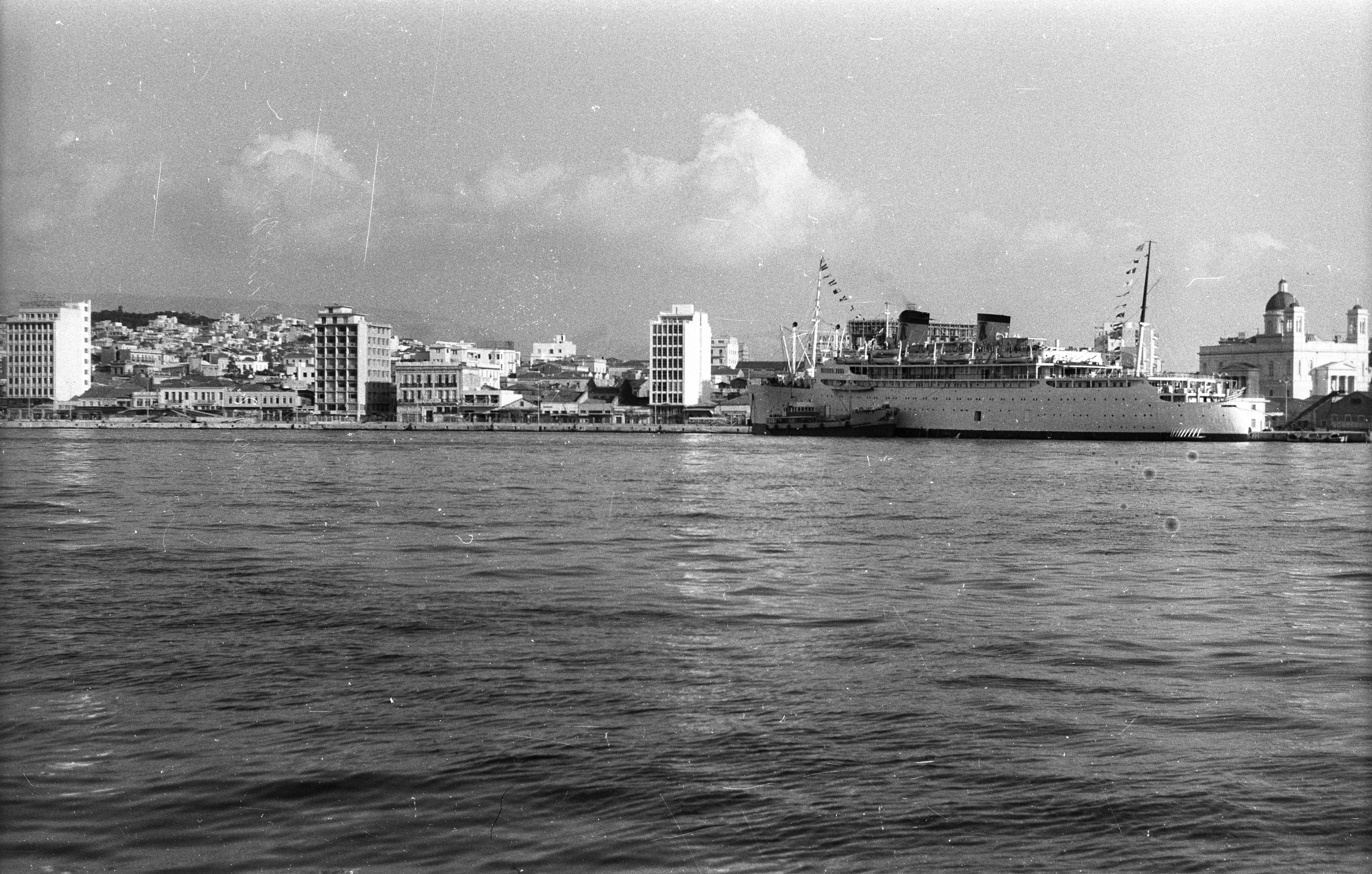 Pireusz, kikötő, jobbra a Szent Miklós templom. Location: Greece, Athens Tags: ship Title: Pireusz, kikötő, jobbra a Szent Miklós templom.